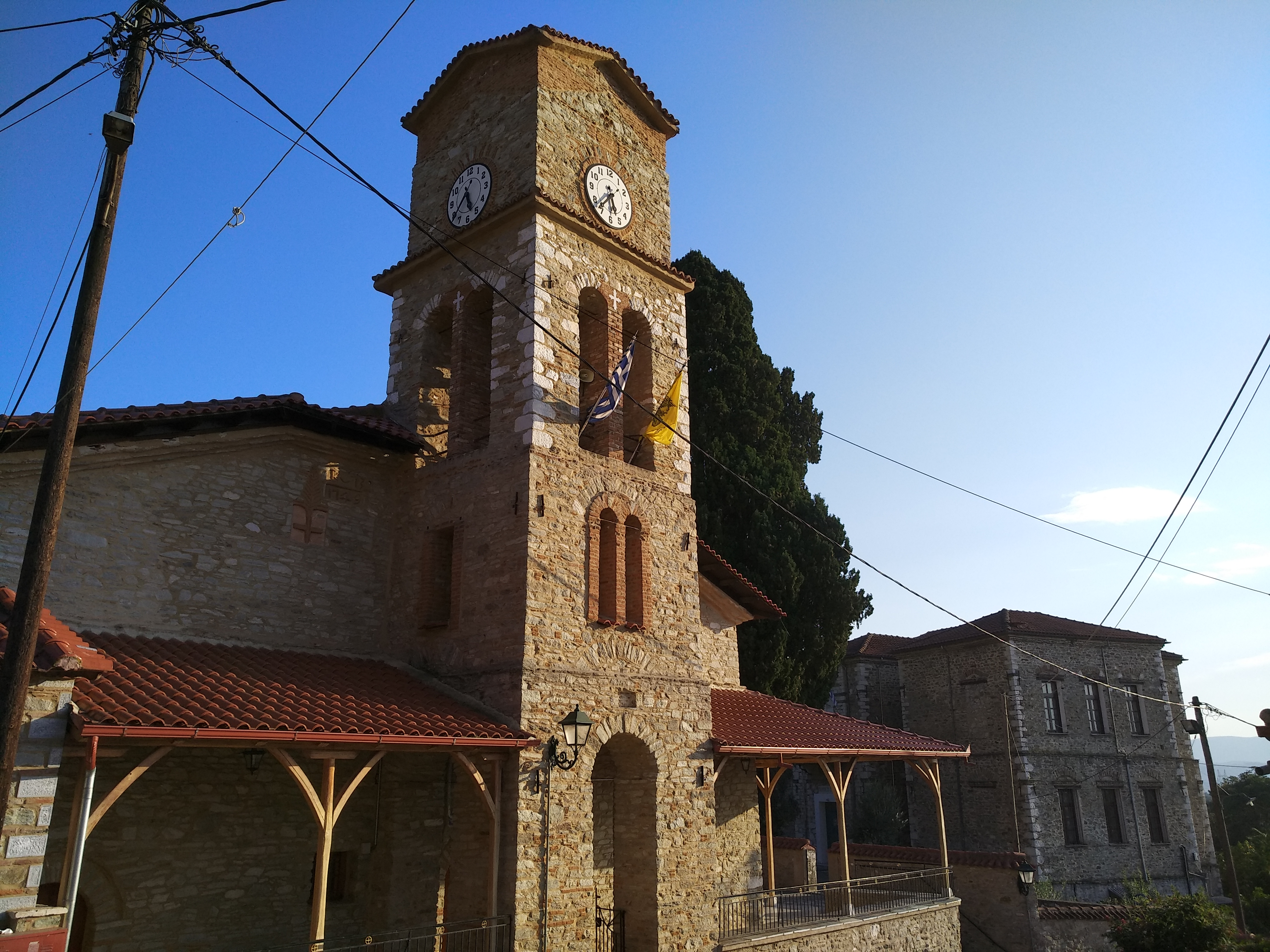 Τσαριτσάνη - ναός Κοιμήσεως της Θεοτόκου_01